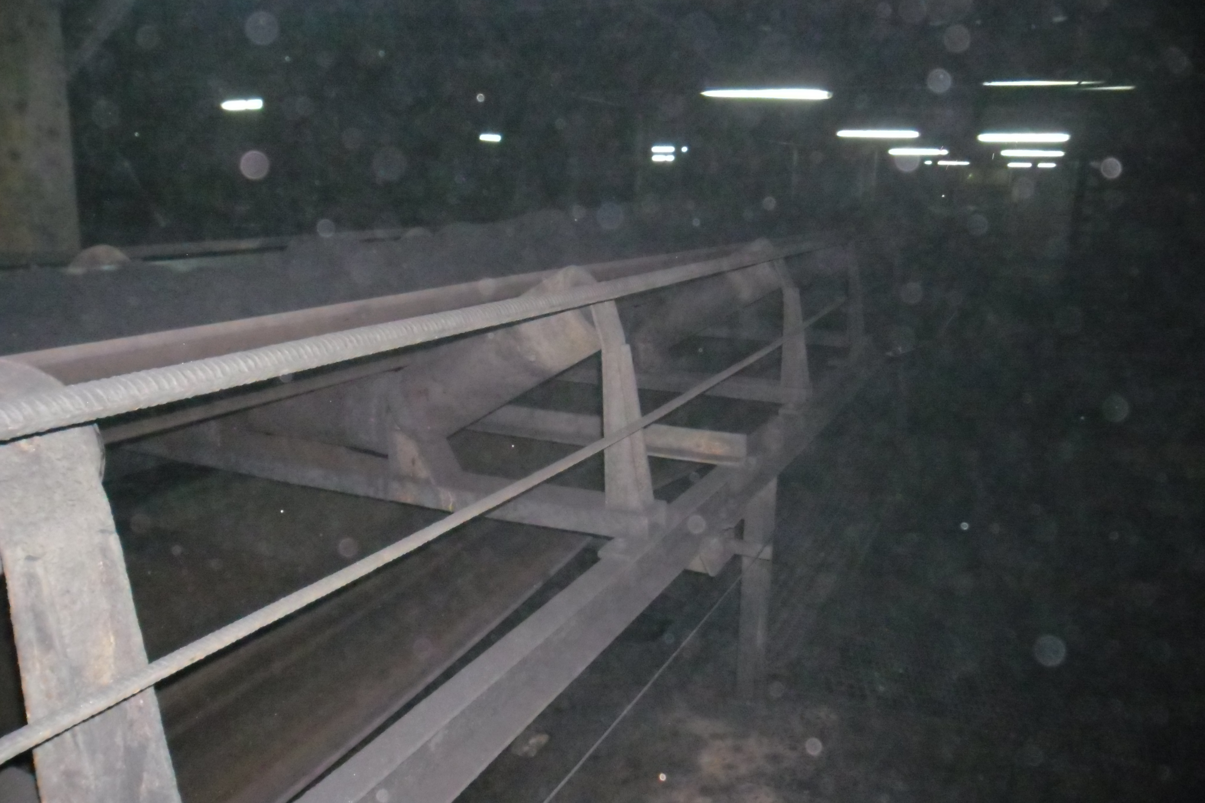 Фото